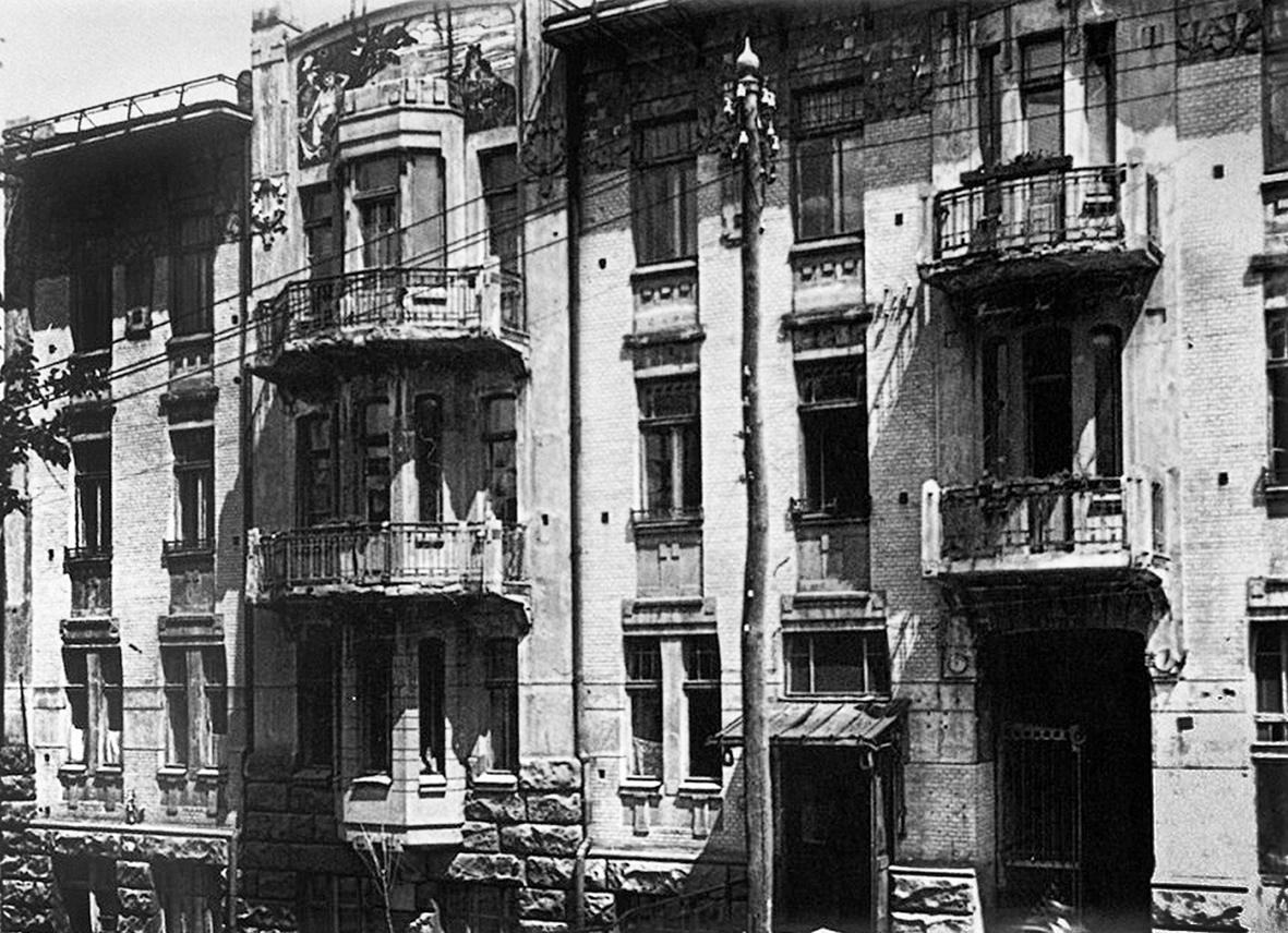 Прибутковий будинок, в якому мешкали до 1917 року — архітектор О. М. Вербицький; у 1930-х роках — церковний діяч Ю. М. Міхновський, Київ, Лютеранська вул., 15/